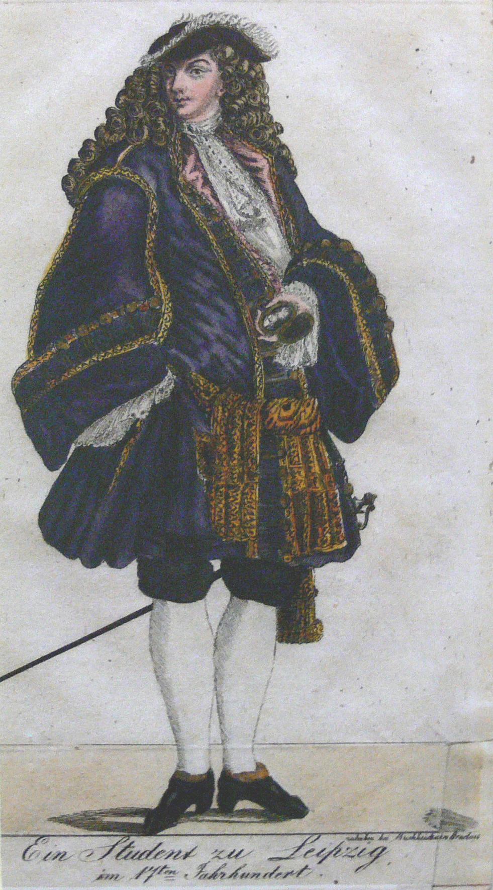 Collection: Café und Museum "Zum arabischen Coffe Baum", Leipzig Leipziger Student um 1690, Kupferstich